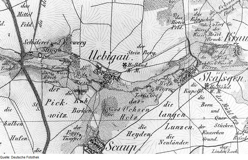 Original image description from the Deutsche Fotothek Zabeltitz-Uebigau. Oberreit, Sect. Großenhain, 1841/43